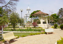 Cidade de São Tiago, Município de Minas Gerais, Brasil